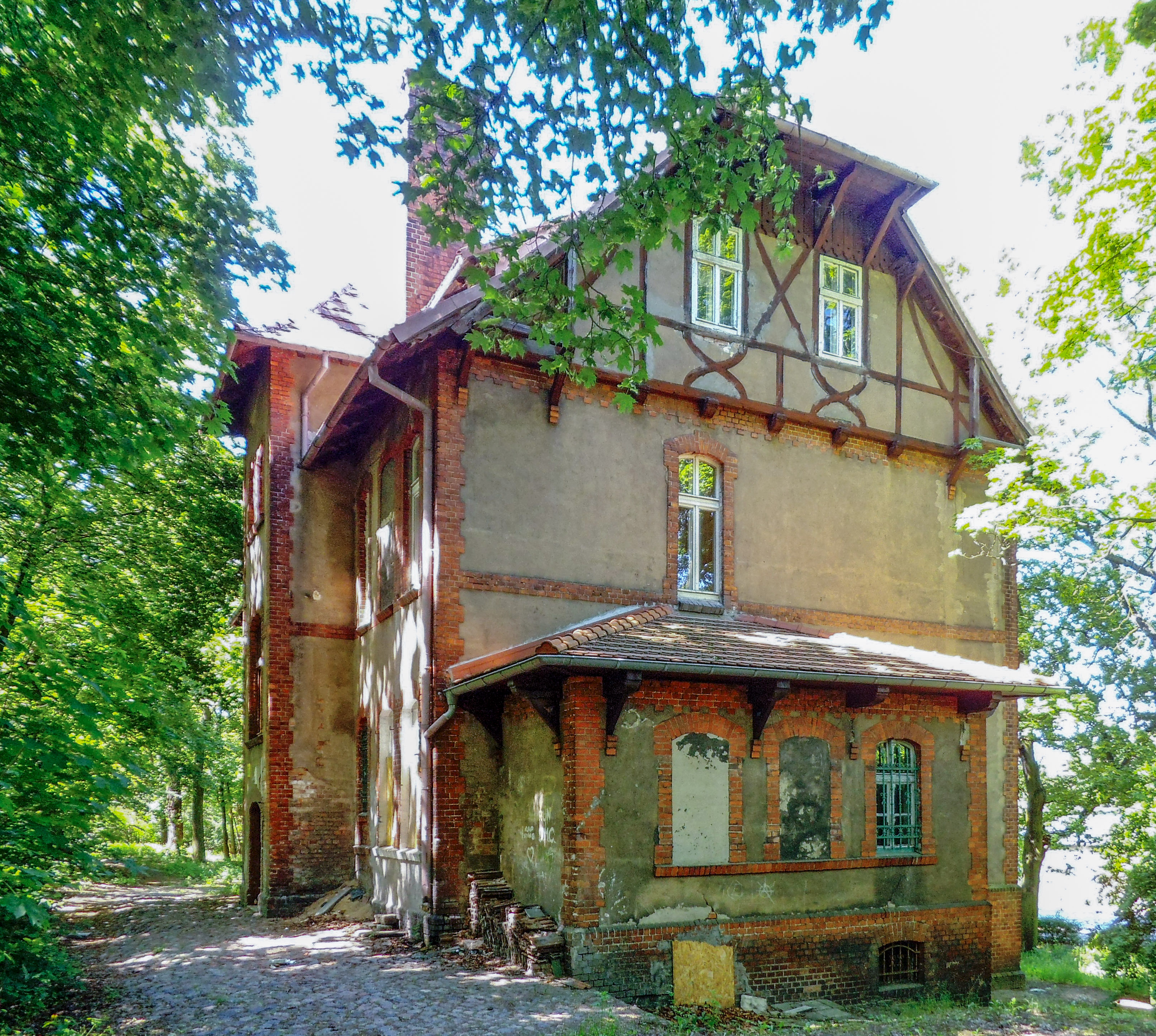 Budynek przy ul. Podgórskiej 2 w Toruniu1